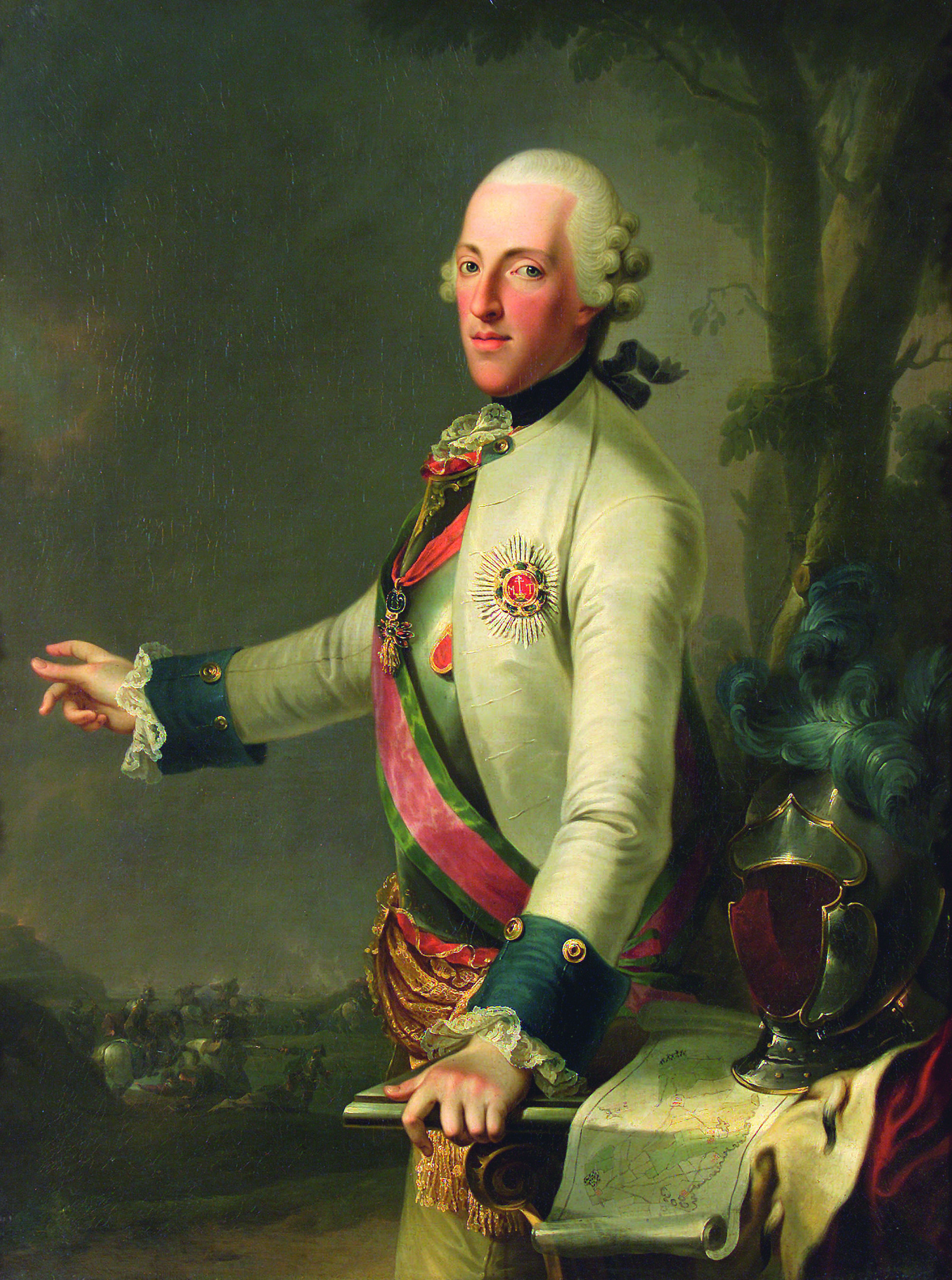 Herzog Albert von Sachsen - Teschen mit dem Plan der Schlacht von Maxen